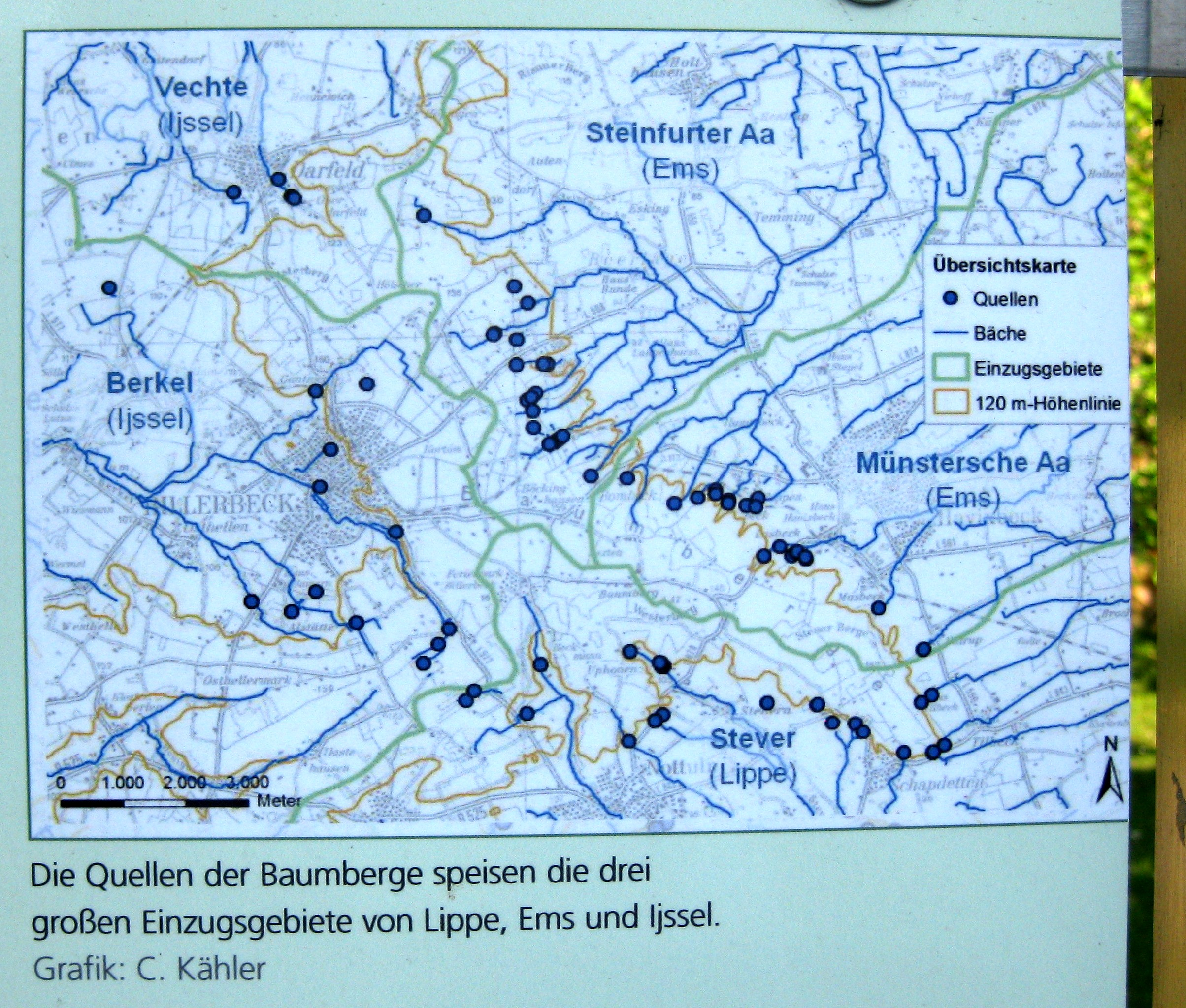 Infotafel am Havixbecker Sansteinweg mit Darstellung der Quellen im Einzugsgebiet von Lippe, Ems und Ijssel